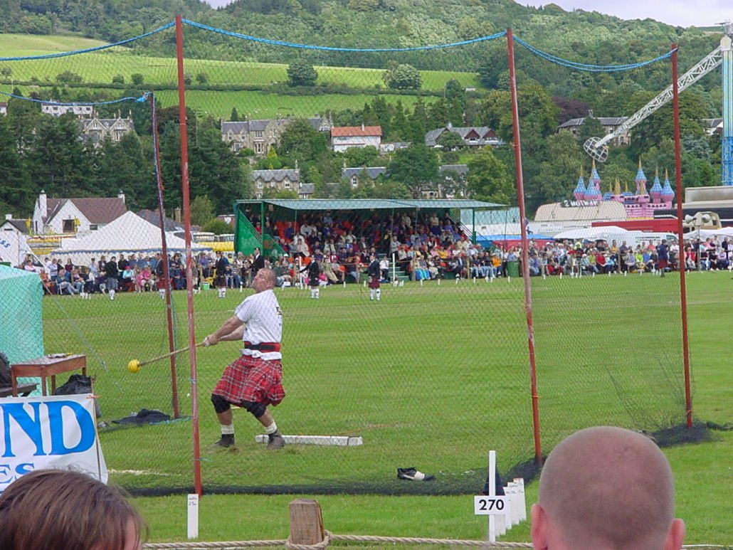 Highlandgames in Stirling (Schottland); Hammerwerfen